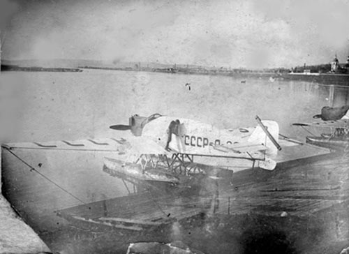 Иркутский гидропорт, середина 1930-х гг.